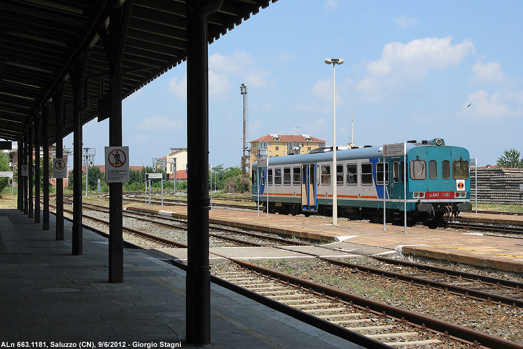 Stazione ferroviaria di Saluzzo. È in sosta l’automotrice ALn 663.1181.